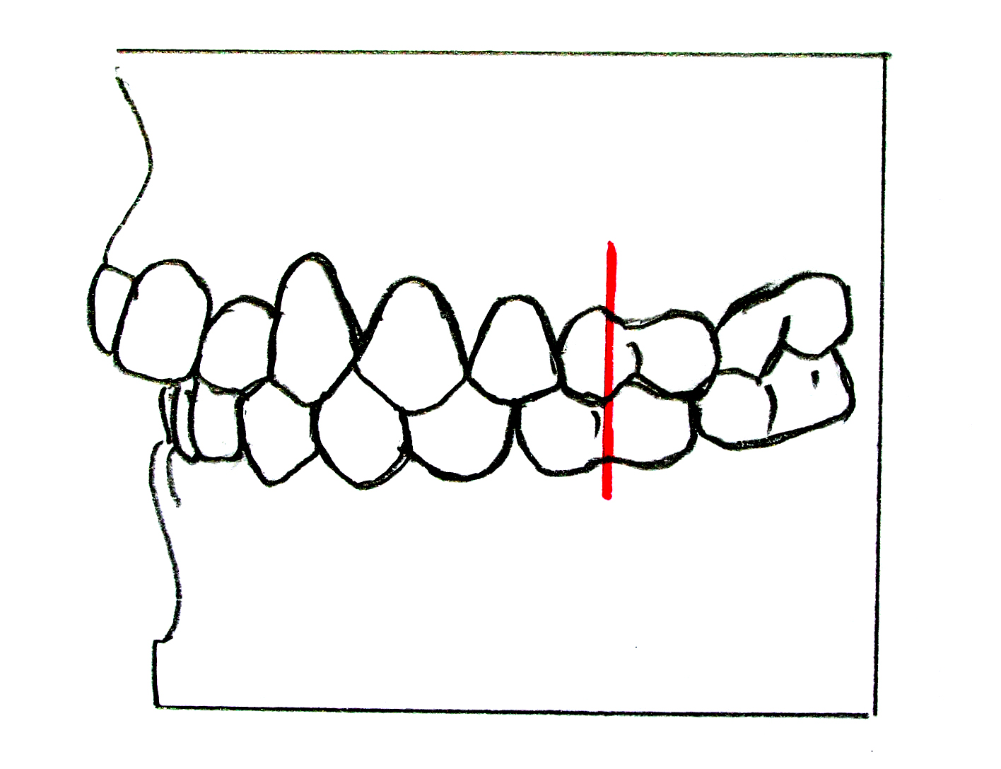 Zahnbeiehungen nach Angle Klasse I. Sonstiges: Kieferorthopädie